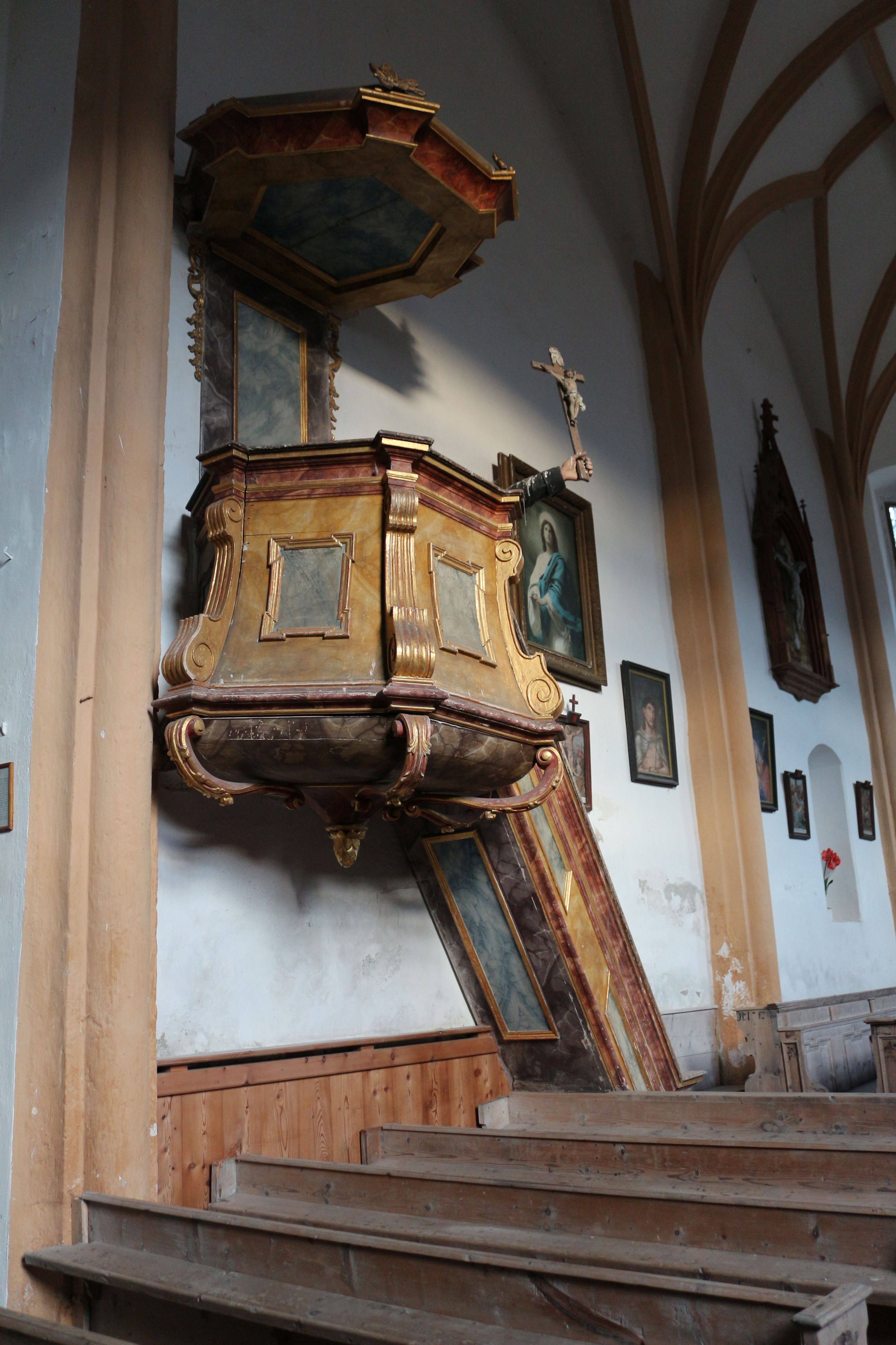 Kanzel der Filialkirche hl. Virgil in Gaishorn am See